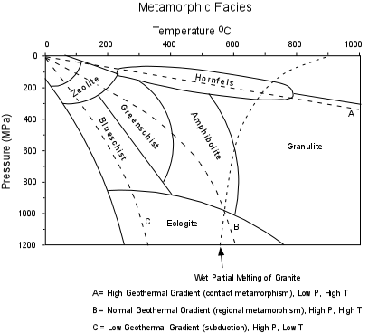 Metamorphic Facies